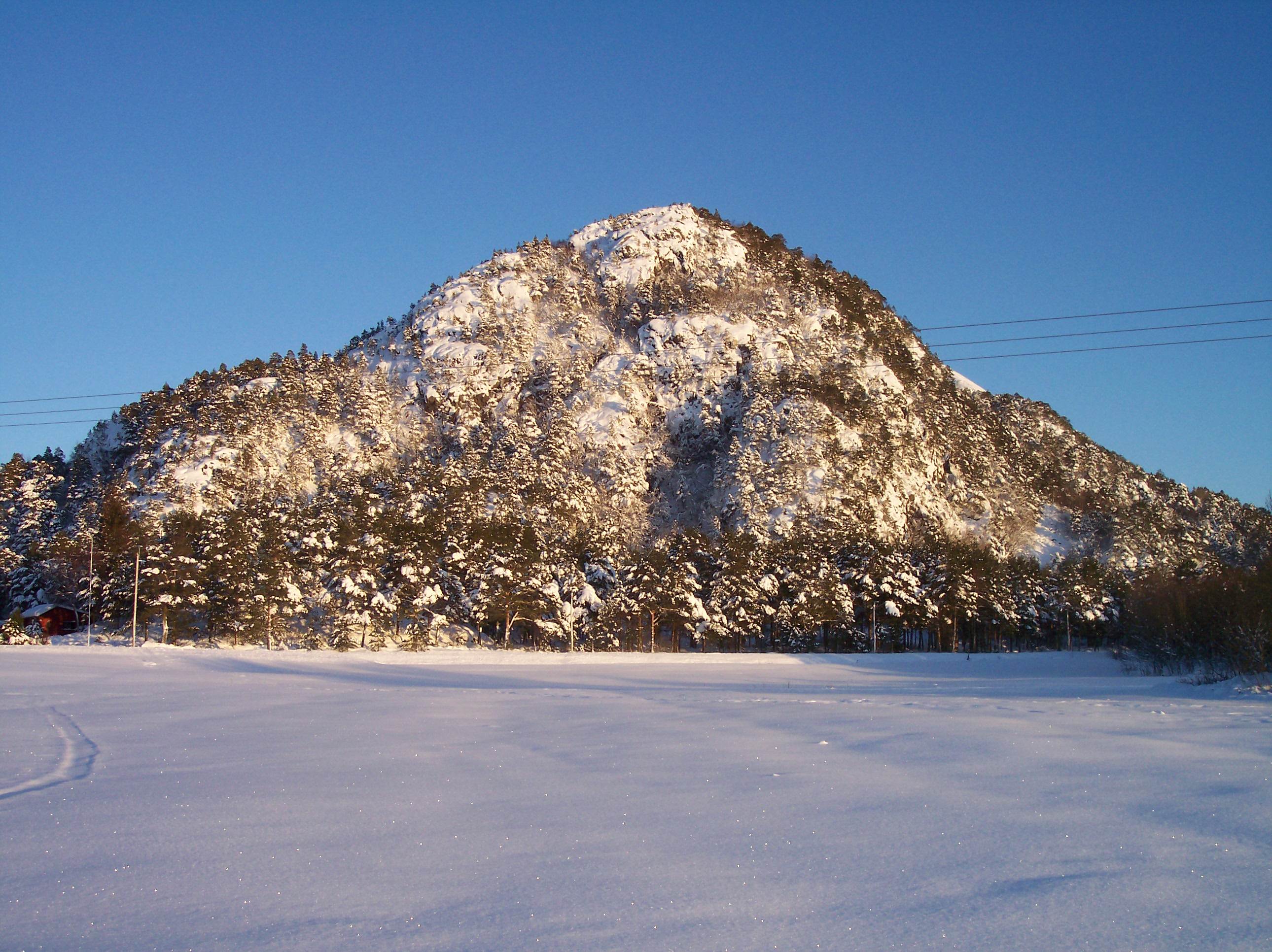 Norsk (nynorsk): Nosa 214 moh, Fræna kommune Norsk (bokmål): Nosa 214 moh, Fræna kommune